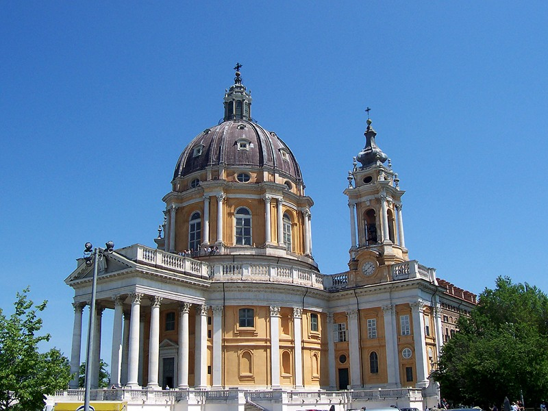 Superga - Basilica